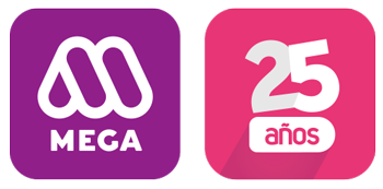 Esta imagen es de cuando el canal cumplió 25 años